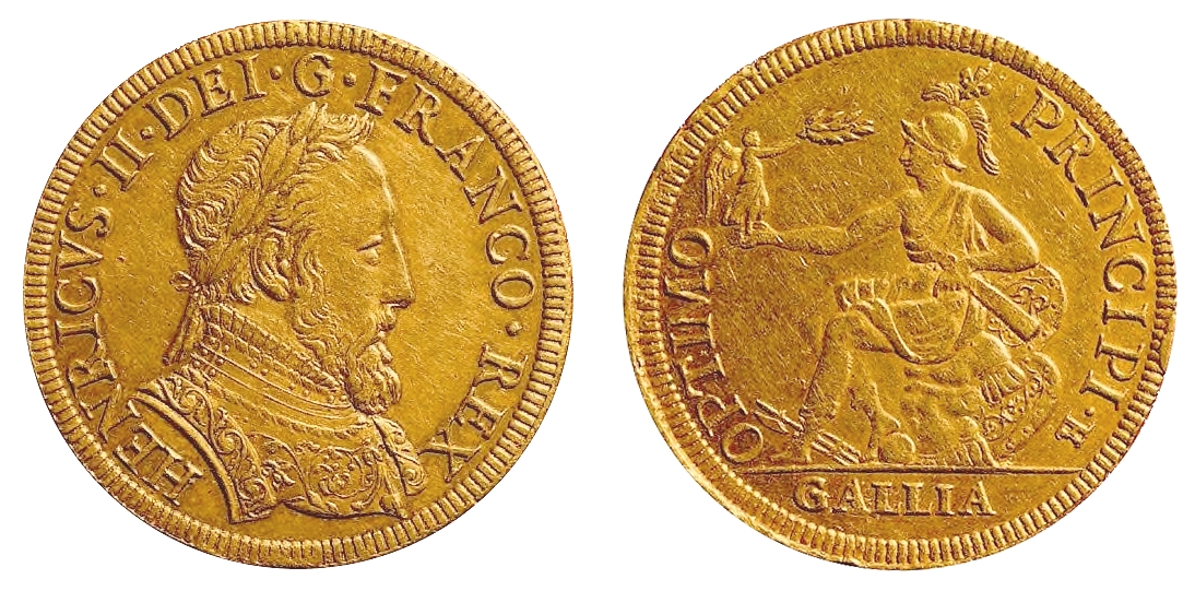 Piedfort du double Henri II à la Gallia. Or, 29,5 gr. Collection du Cabinet des Médailles de la Bibliothèque nationale de France. Exemplaire unique. Sur la tranche + DISCDITE A ME OMNES QVI OPERAMINI INIQVITAT.1555.